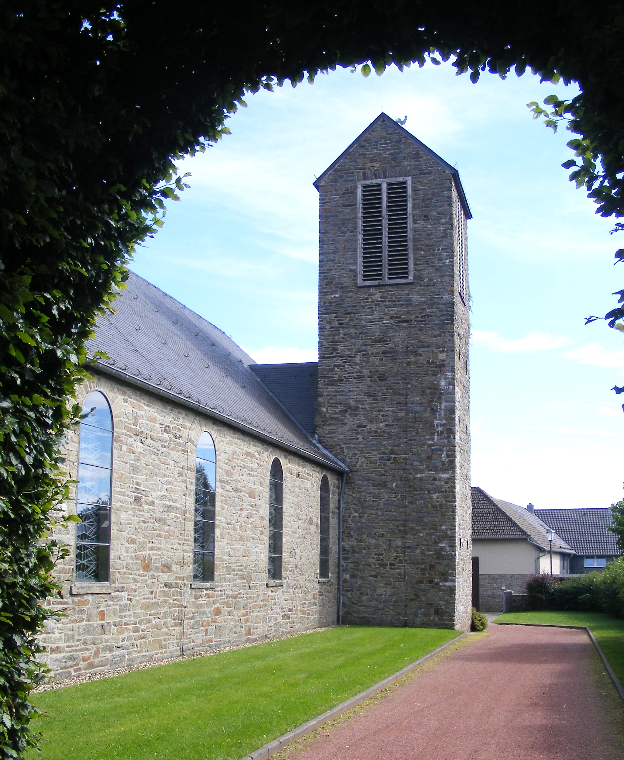 Simmerath Eicherscheid Kirchturm KirchstraßeThis is a photograph of an architectural monument., no. 6